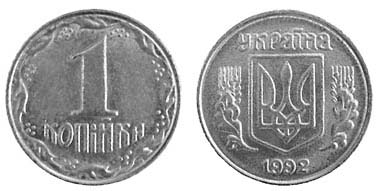 1 українська копійка